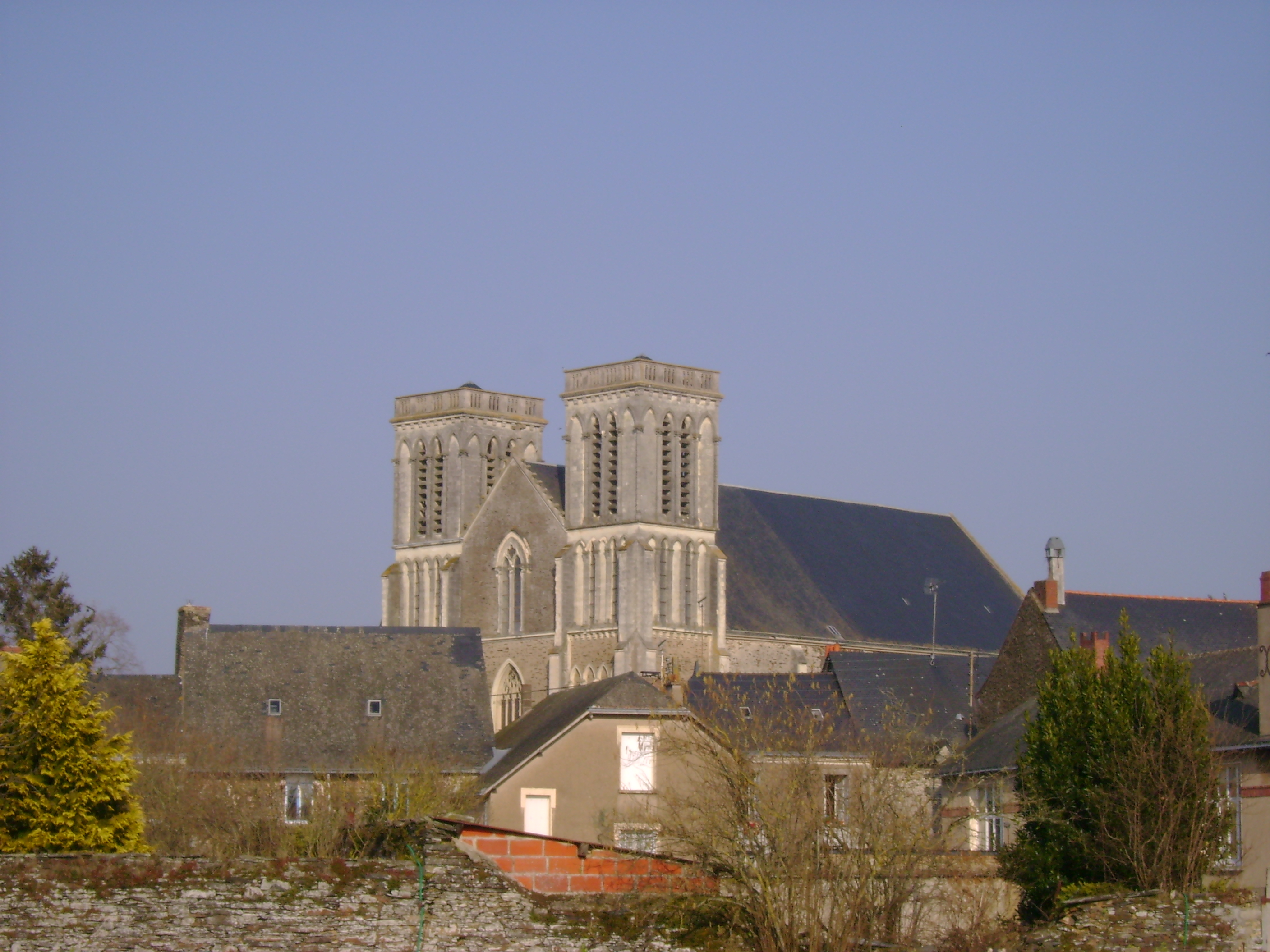 L'église et les toits des vieux quartiers de Candé